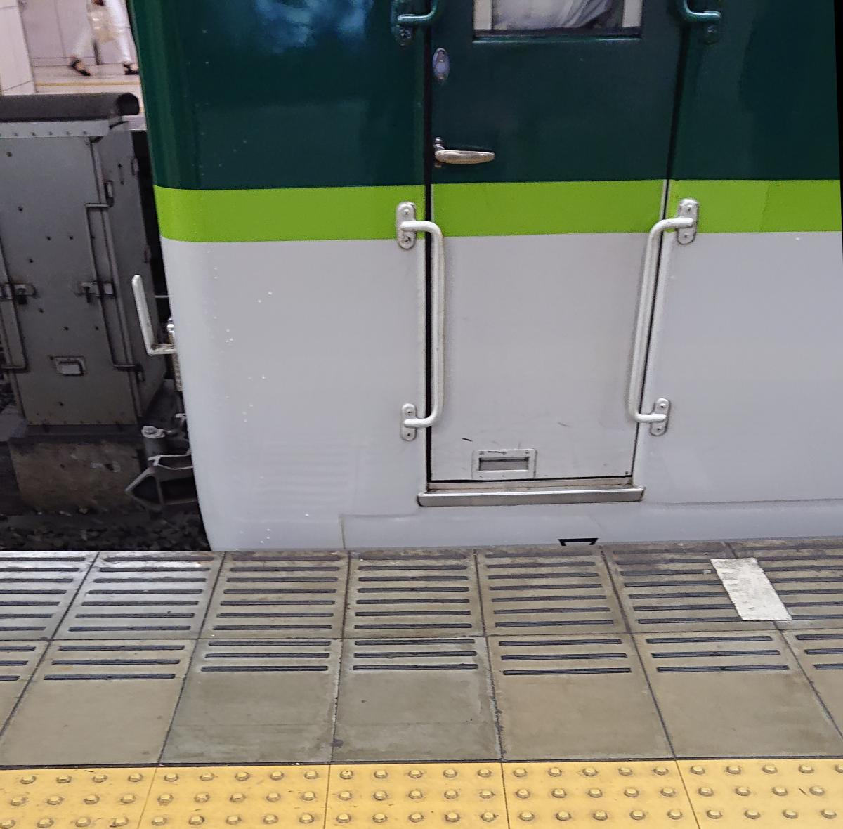 京阪1000系電車 (3代)、車体改修工事後の運転席側面。同工事で乗務員室拡大のために台枠が延長されたことがわかる。（2019年9月4日 天満橋駅にて撮影）